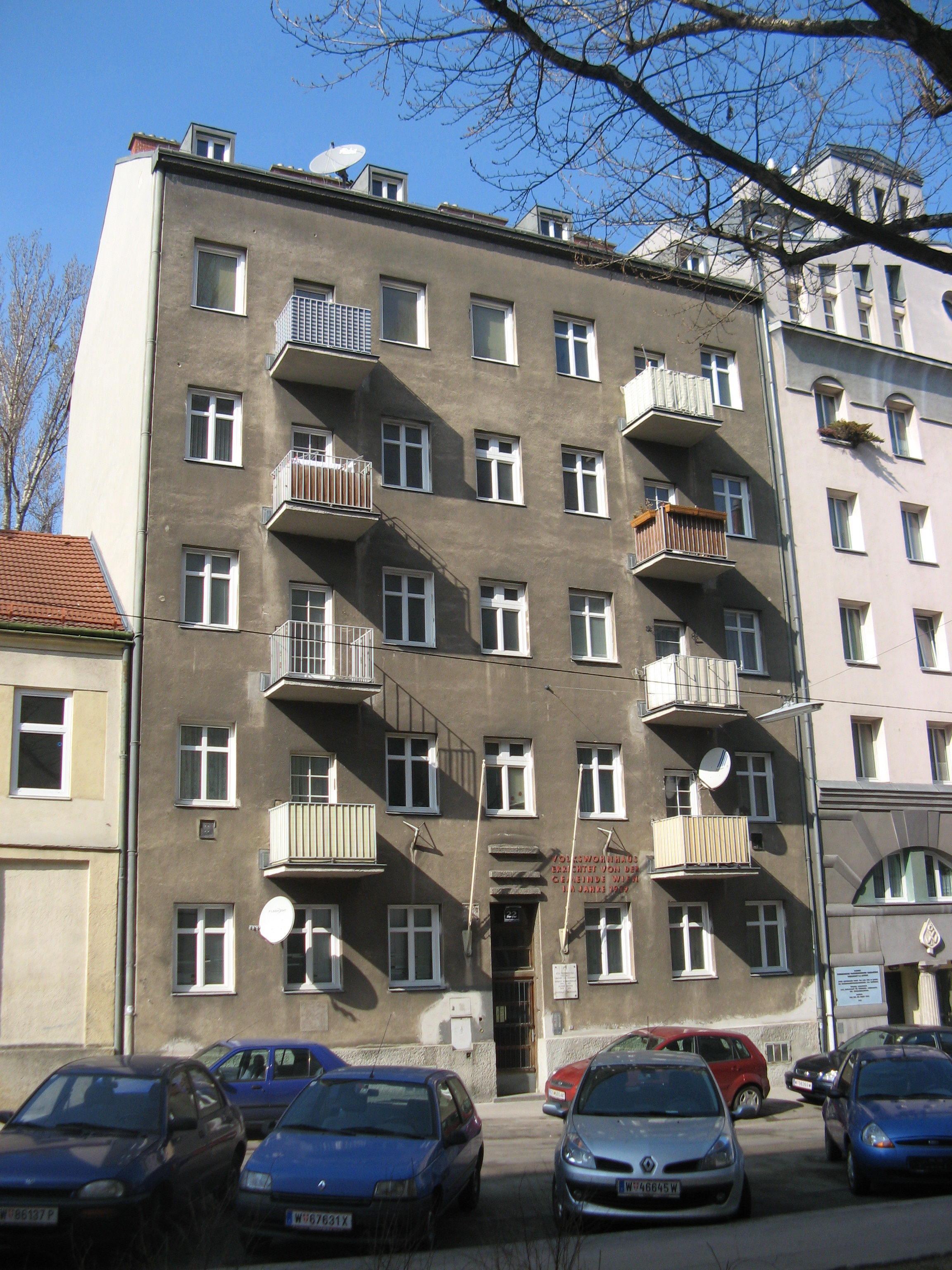 Gemeindebau (1929) von Josef Berger, Schrankenberggasse 22, Wien-Favoriten